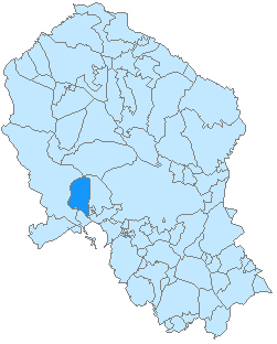 Mapa de Posadas en la provincia de Córdoba, Andalucía, España.